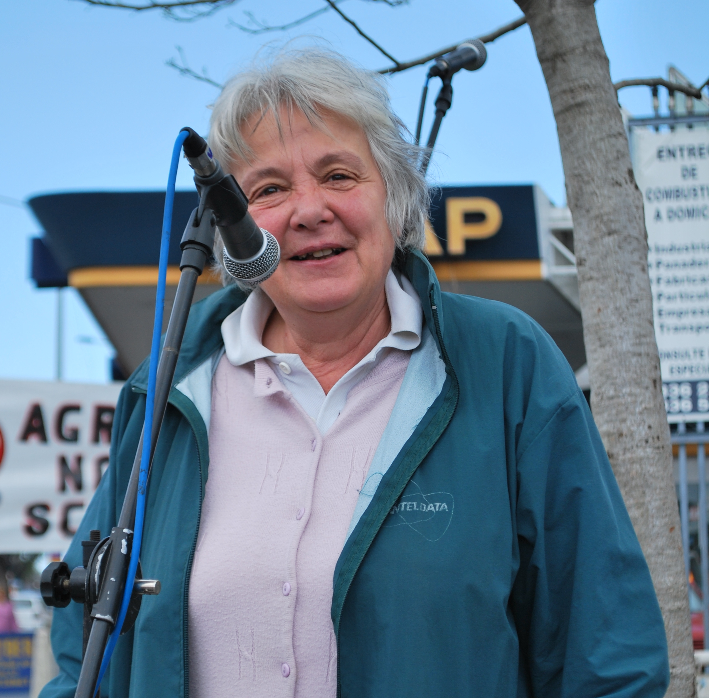 La política de Uruguay Lucía Topolansy en una actividad del Espacio 609 en el marco de la campaña del Frente Amplio hacia las elecciones presidenciales de 2009.